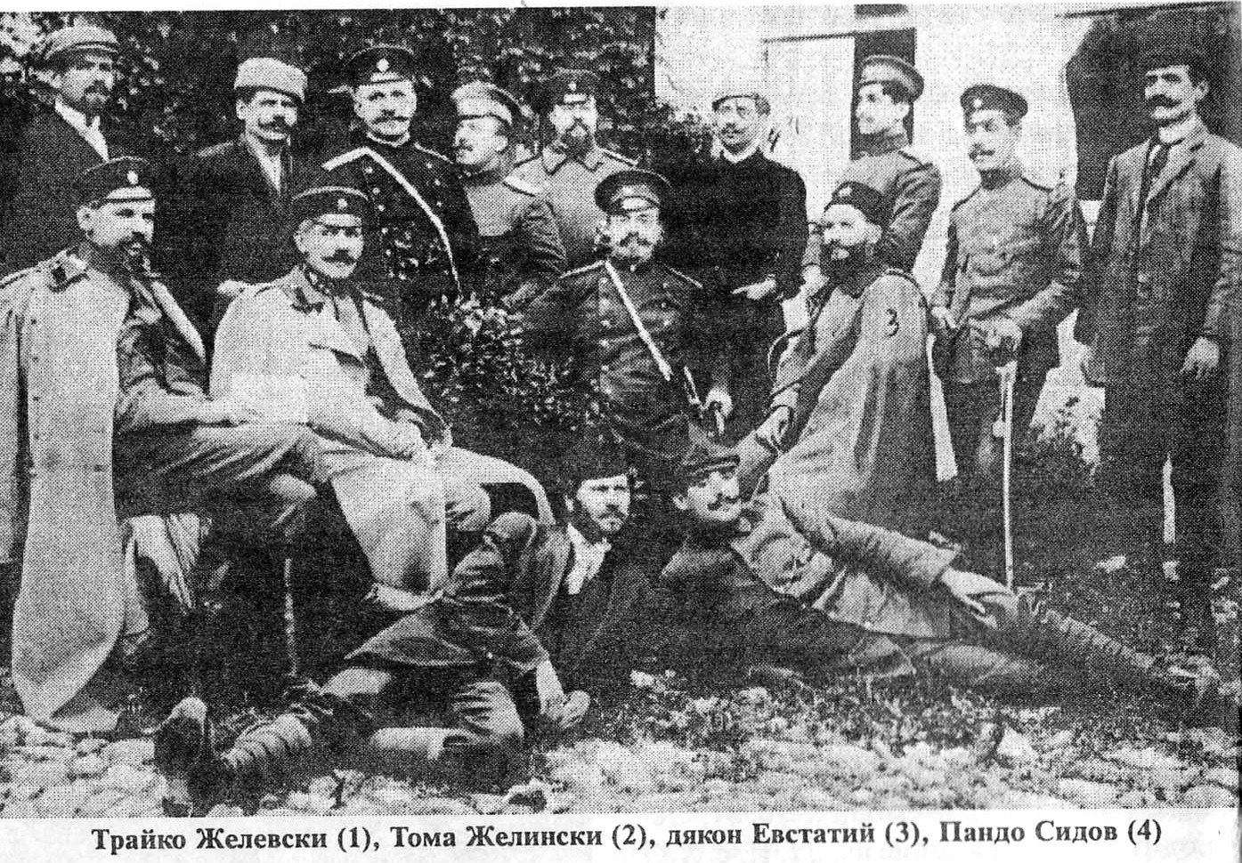 Trayko Zhelevski, Toma Zhelinski, Dyakon Evstatiy, Pando Sidov and other MOO members